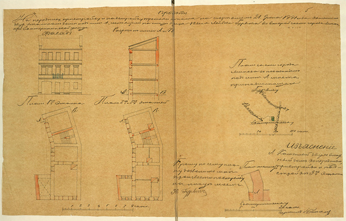 Беларуская (тарашкевіца): Менск (Miensk), вуліца Няміга (vulica Niamiha). Праект камяніцы